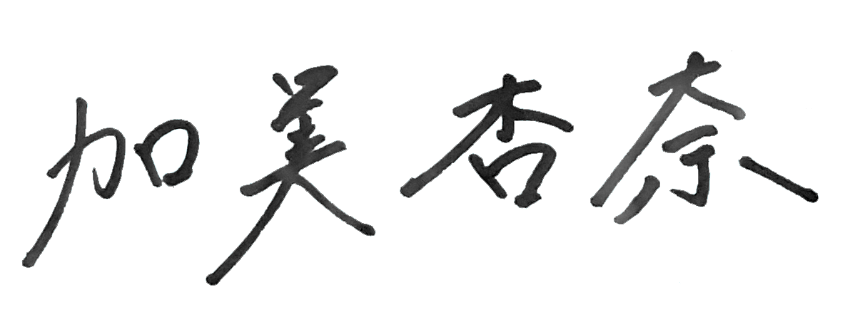 KAMI ANNA Sign